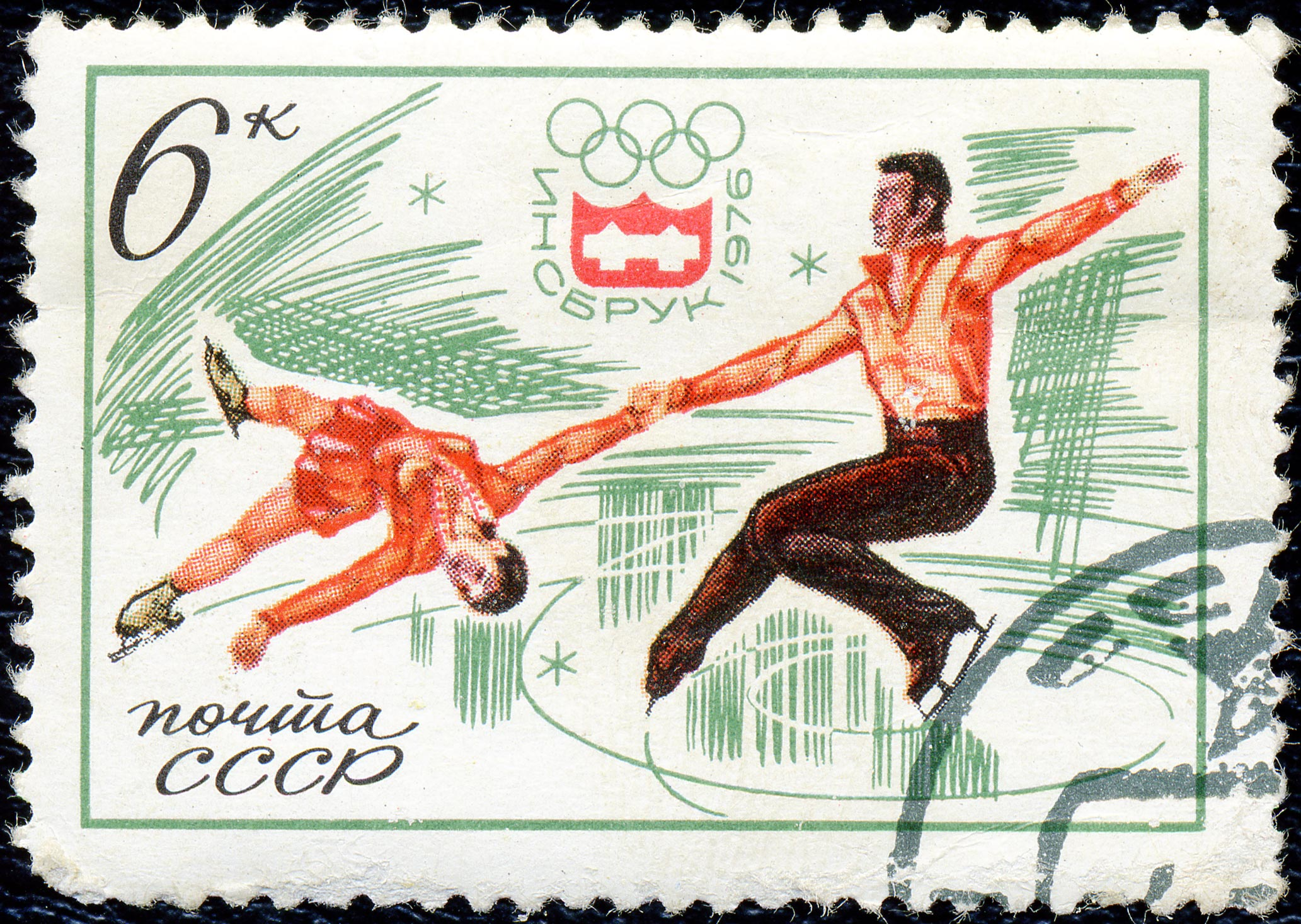 Почтовая марка СССР. 1976. XII Зимние Олимпийские игры. Фигурное катание